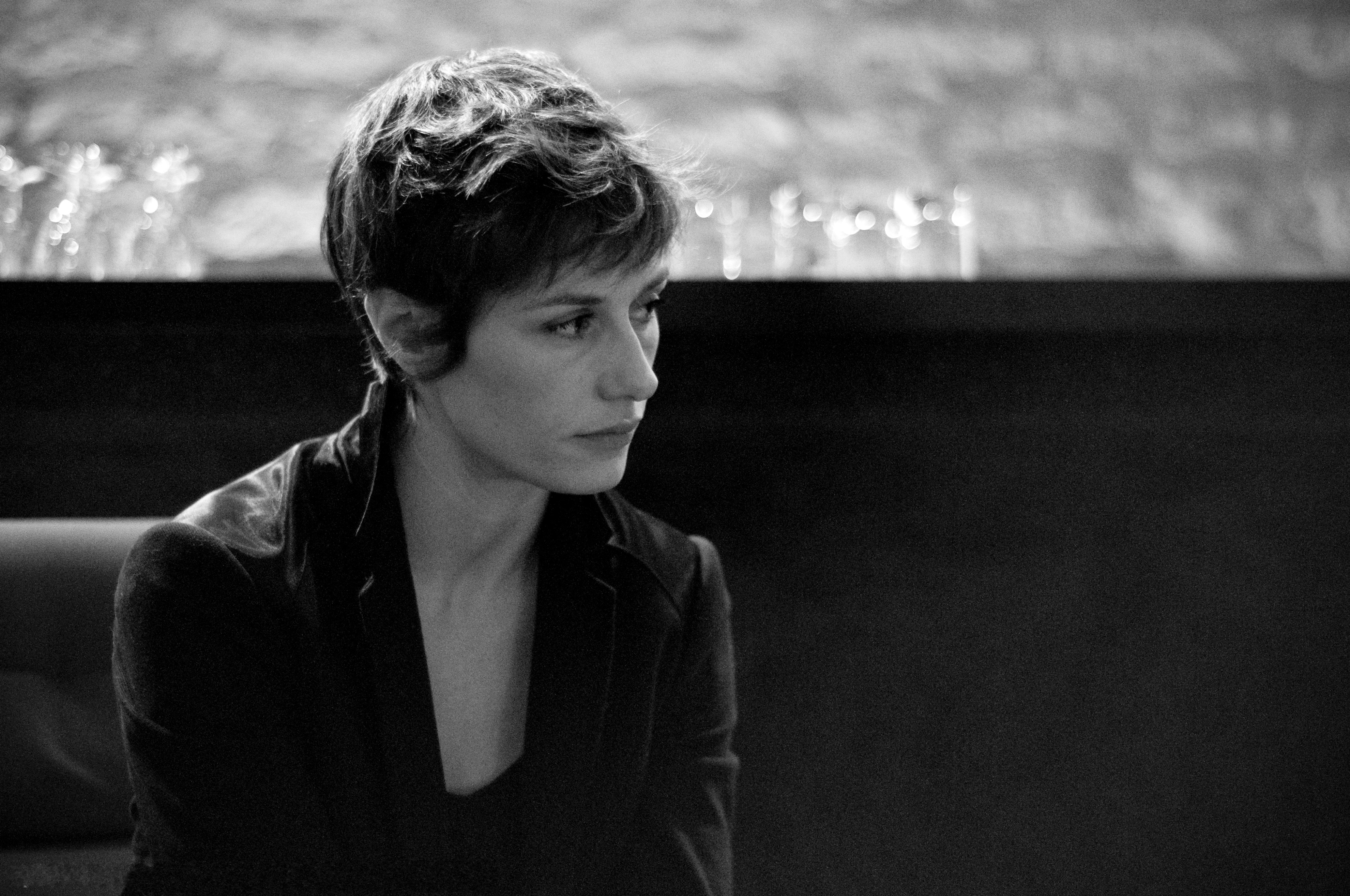 Cécile de France, Auxerre, 6 avril 2009